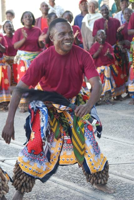 Danza Ngoni en Tanzania